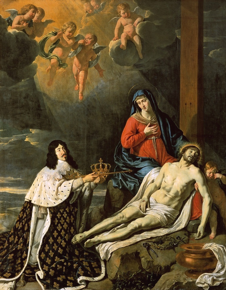 Tableau du Musée des Beaux-Arts de Caen, France